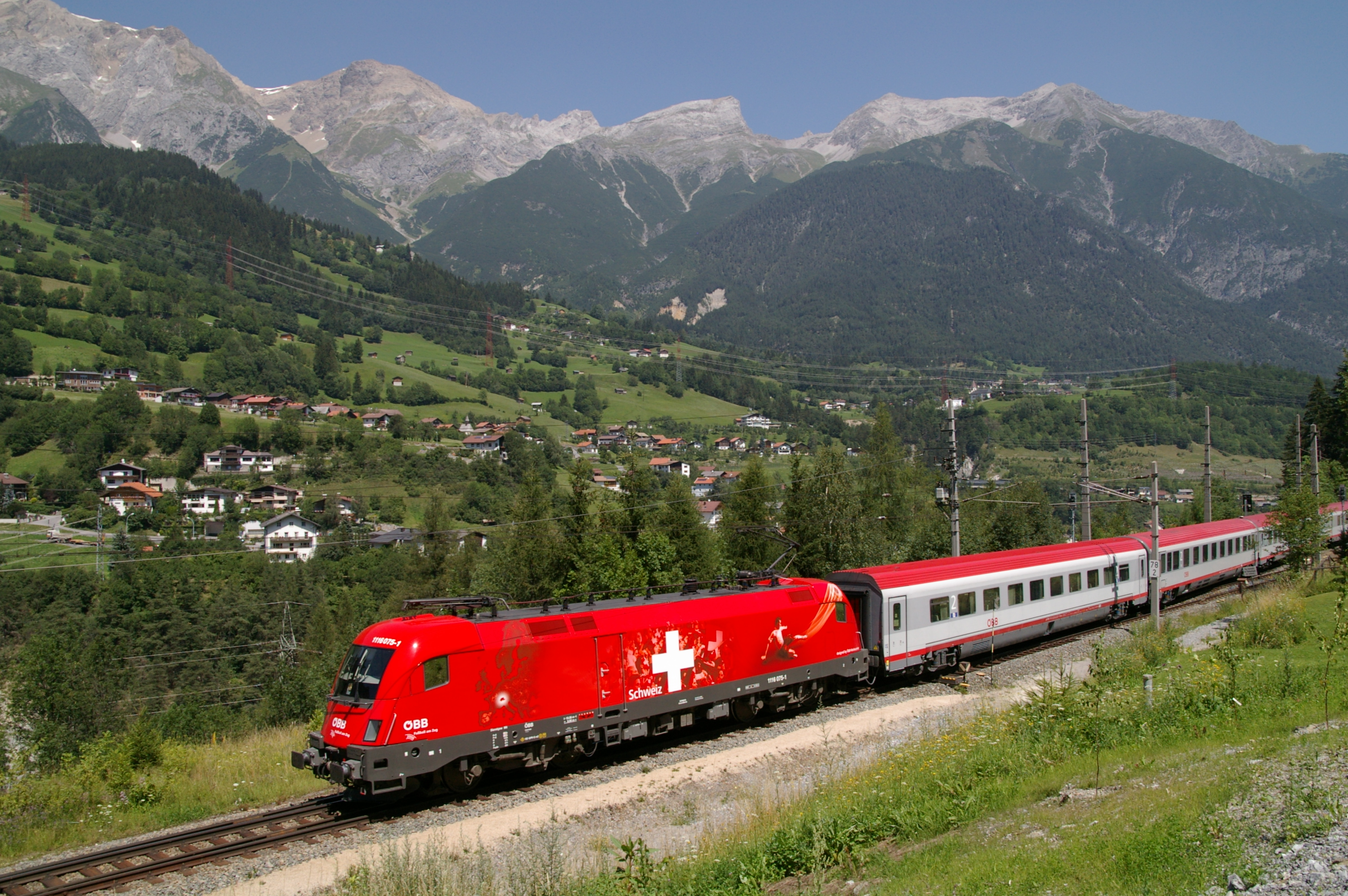 EM-Taurus Schweiz mit ÖBB EC 662 bei der Durchfahrt in Pians. Im Hintergrund von links nach rechts: Gatschkopf (2945 m), Blankahorn (2822 m), Wannenkopf (2821 m) und Rauher Kopf (2811 m)